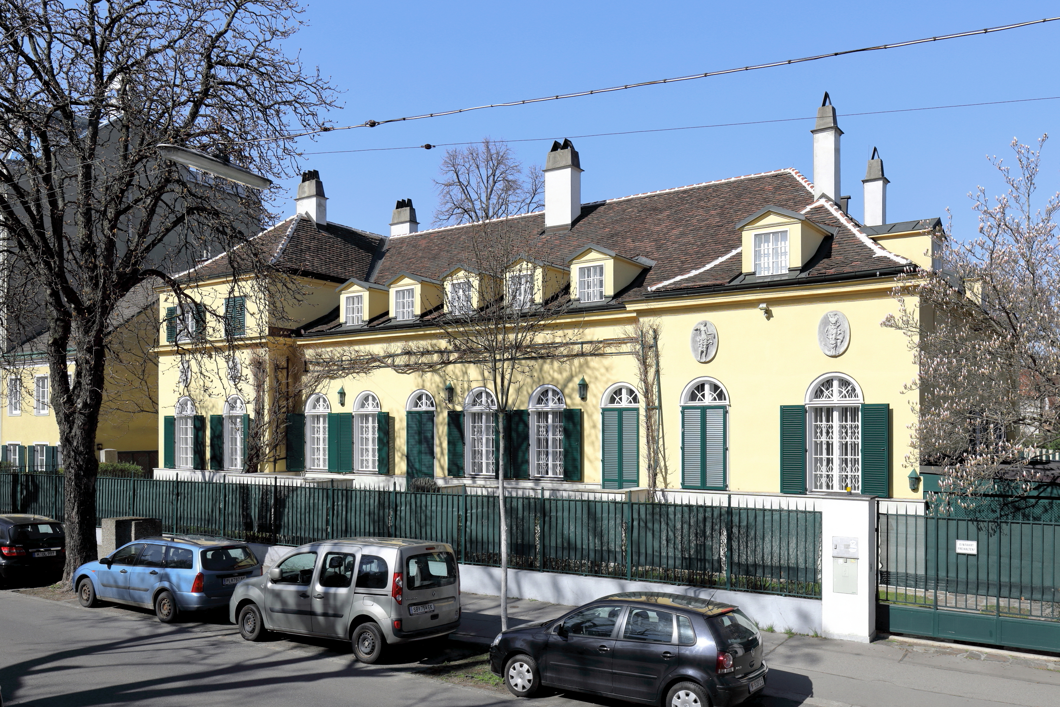 Das „Braunschweigschlössl“ im 13. Wiener Gemeindebezirk Hietzing.Ursprünglich war es ein um 1875 vom Baumeister Josef Kopf errichtetes Nebengebäude (Dependance Villa Braunschweig) der um 1840 vom Hofarchitekten Johann Julius Romano von Ringe gebauten Villa Hügel. 1854 kaufte Herzog Wilhelm von Braunschweig die Villa. Diese wurde jedoch bis auf das Nebengebäude („Braunschweigschlössl“) 1912 abgetragen. Das Braunschweigschlössl selbst wurde ab 1886 mehrfach um- und ausgebaut. 1981 wollte der damalige Besitzer die Villa abreißen und an ihrer Stelle ein fünfgeschoßiges Wohnhaus errichten lassen. Dies wurde jedoch durch Proteste der Bevölkerung verhindert.